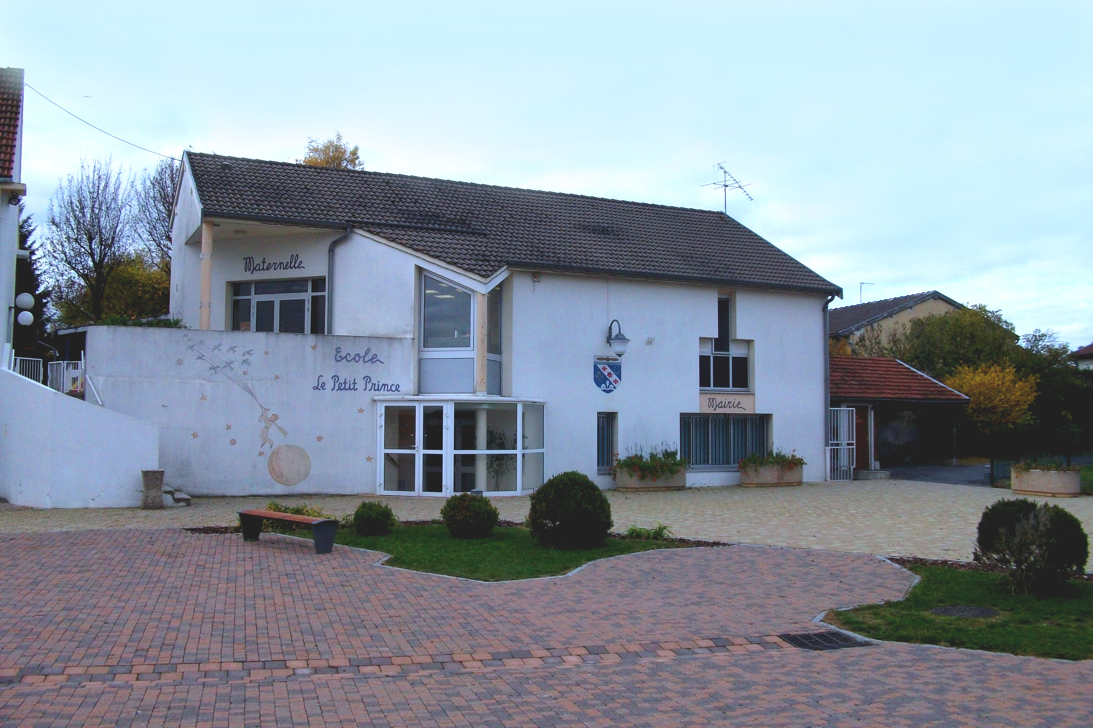 Mairie et école de Bouy.